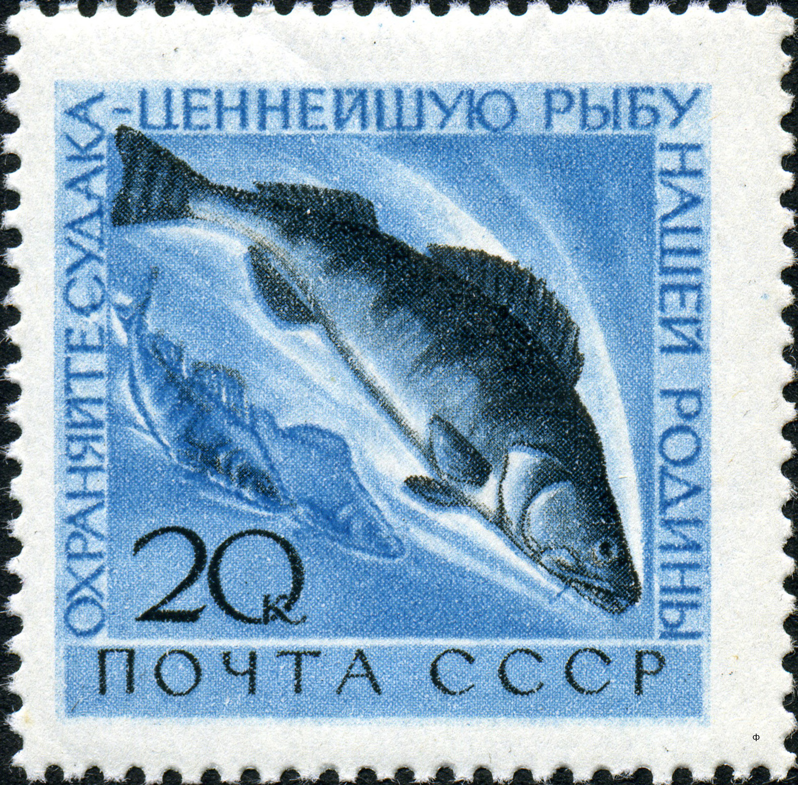 Марка СССР